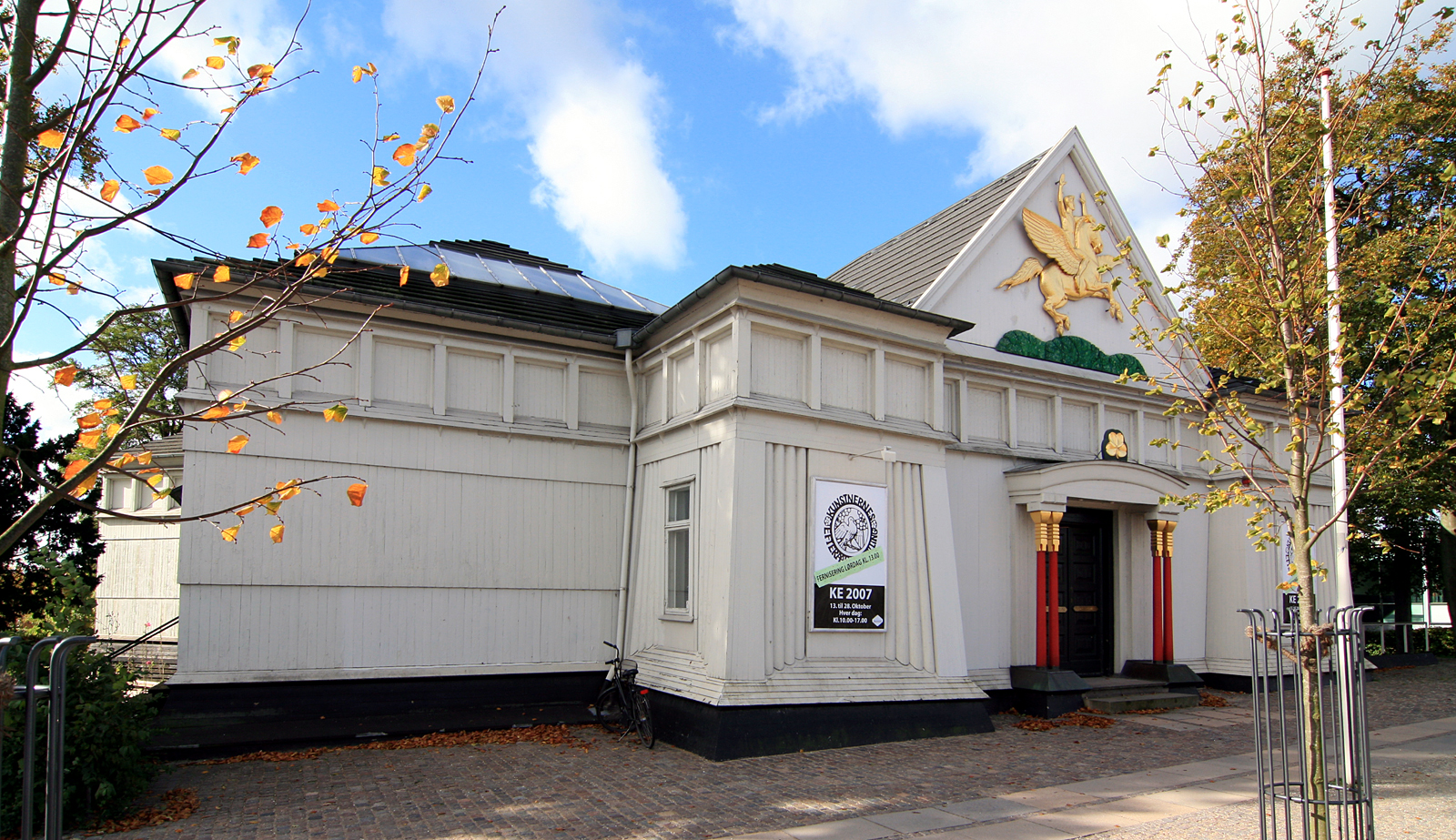 Den frie Udstilling, Oslo Plads, København. Bygget 1898. Arkitekt: Jens Ferdinand Willumsen.